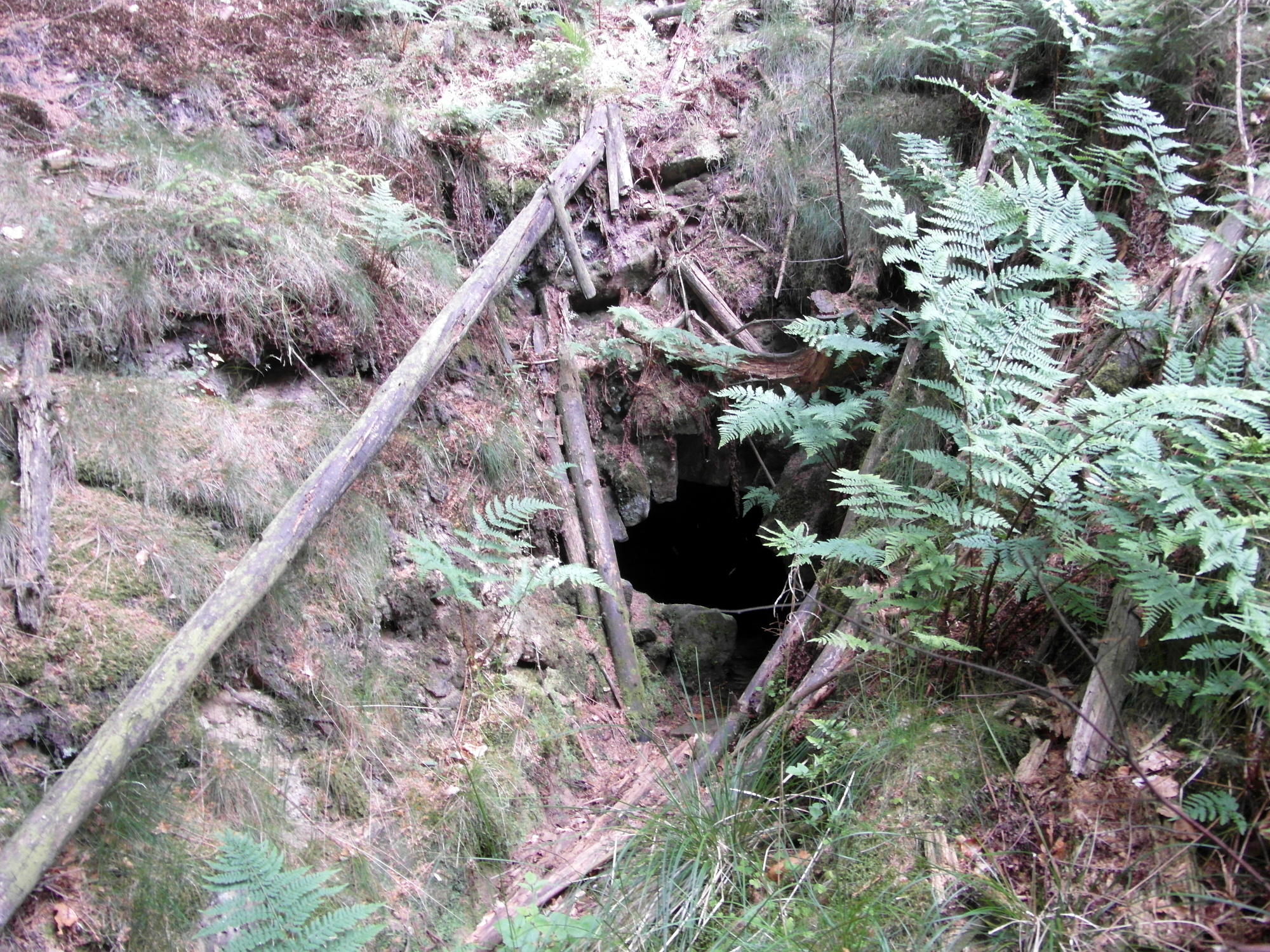 Eingang des Oberen Feldbergstollen im Deister bei Wennigsen.